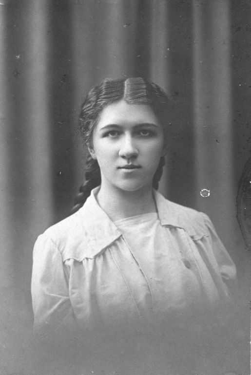 Pola Maciejowska, właśc. Paulina Maciejowska (ur. 3 lutego 1899 w Kowlu, zm. 11 listopada 1920 w Bytomiu) – polska działaczka społeczna, uczestniczka II powstania śląskiego, współpracownica Wojciecha Korfantego.